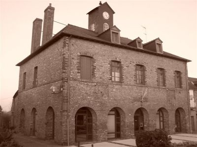 Mairie de Saint Germain sur Ille (35)